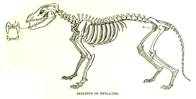 Thylacine skeleton